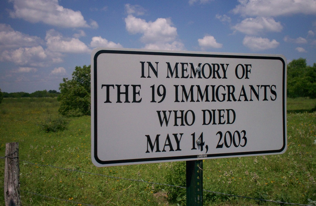 BABYTEXCOCO tomo esta foto en Victoria, TX en mayo del 2007